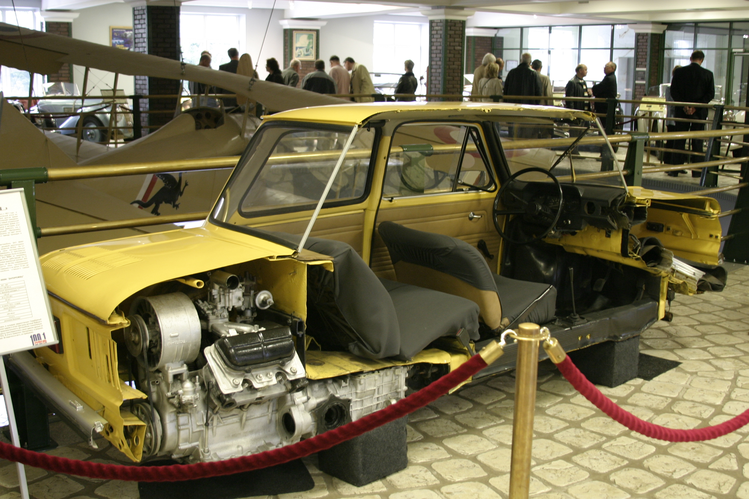 Cut open ZAZ-968M Zaporozhets in Arkhangel'skoye, Moskovskaya Oblast, Russia.